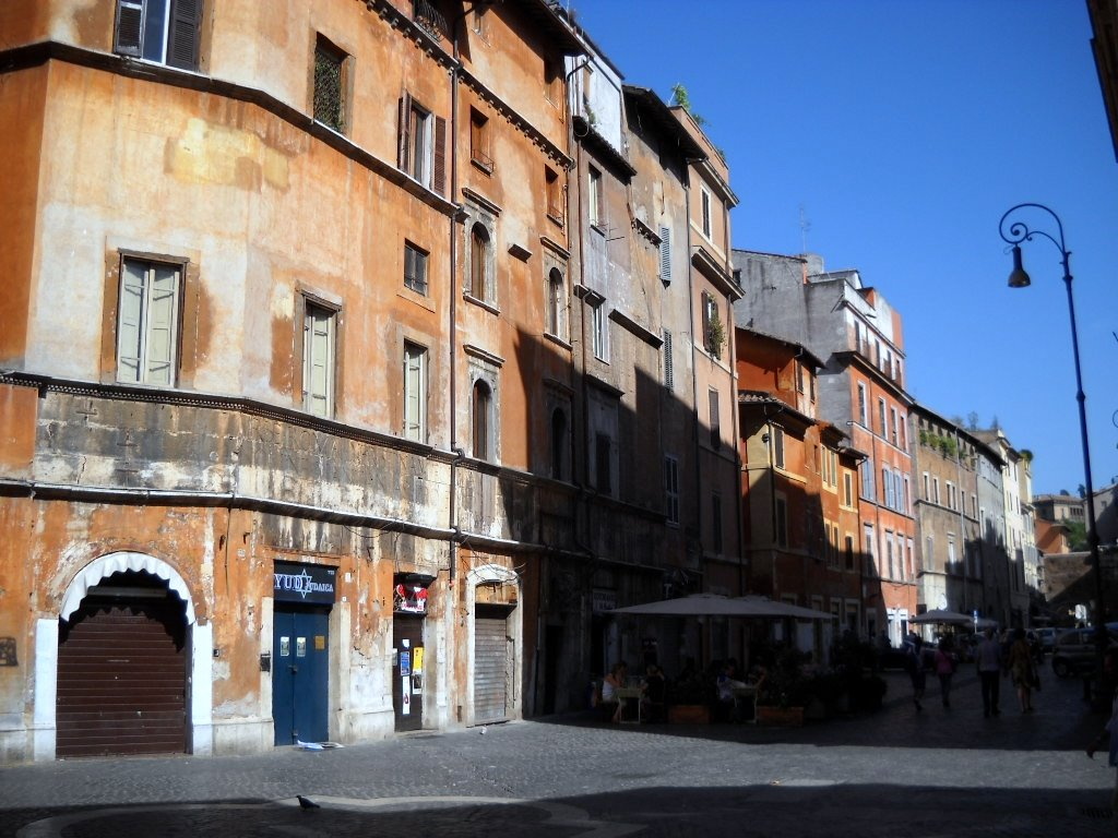 roma ghetto